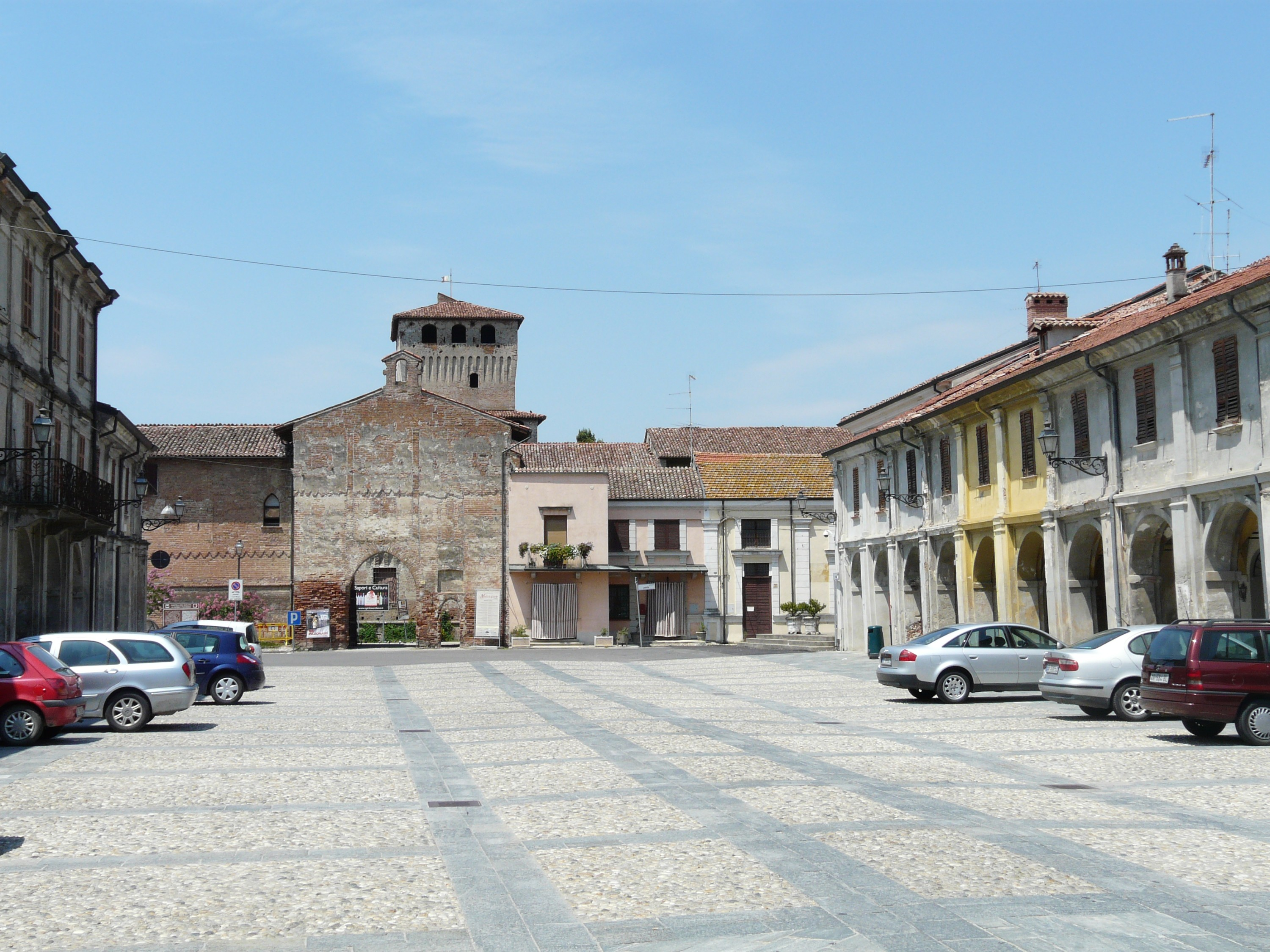 Piazza Cavour, Roccabianca, Emilia-Romagna, Italia